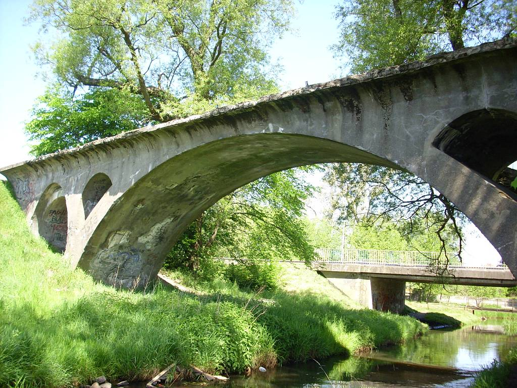 Białogard. Nieużywany most kolei wąskotorowej nad Kanałem Ulgi.